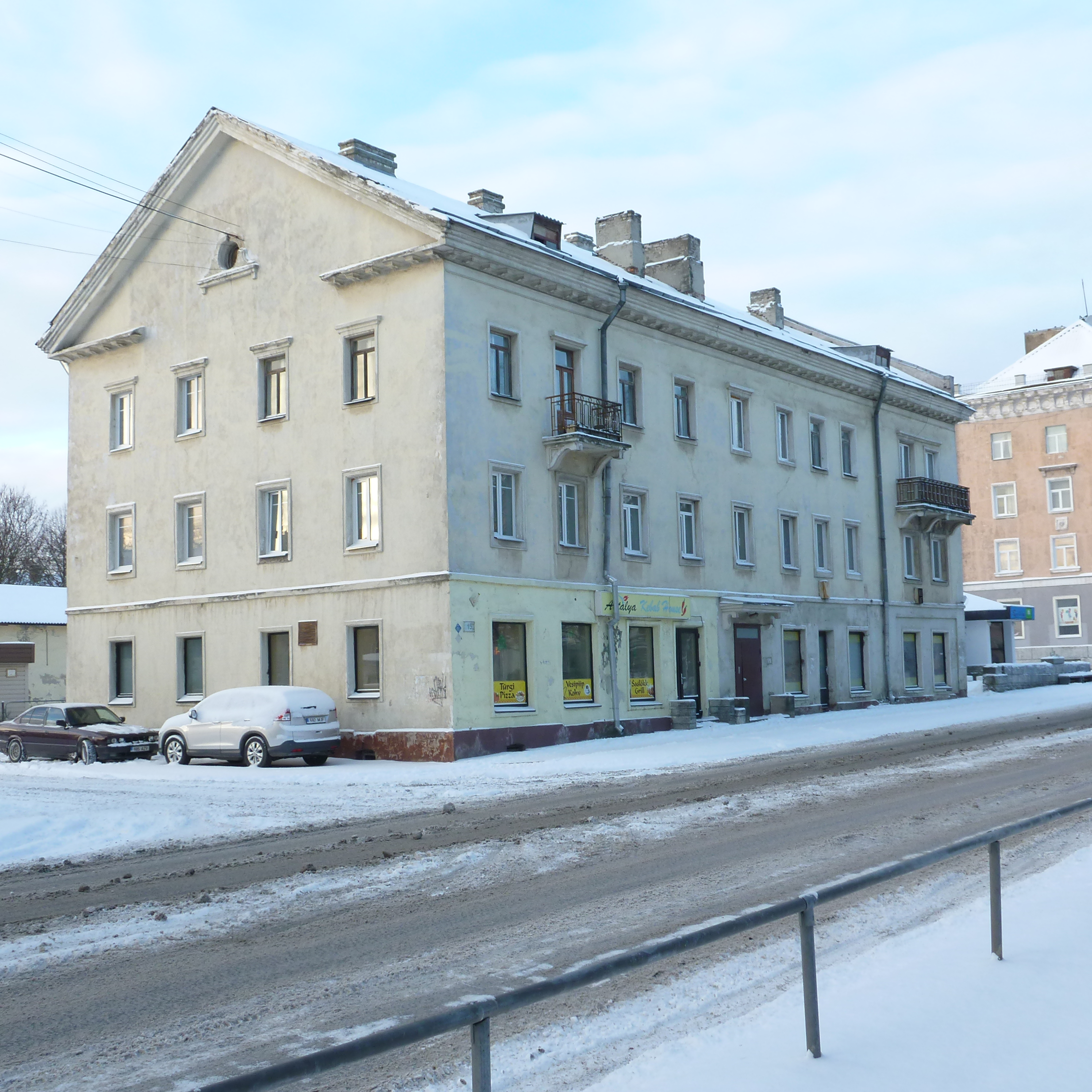 Talo Pushkini-kadulla